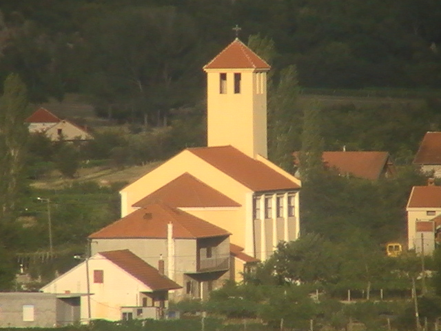 Crkva Kraljice Mira u Kričkama.